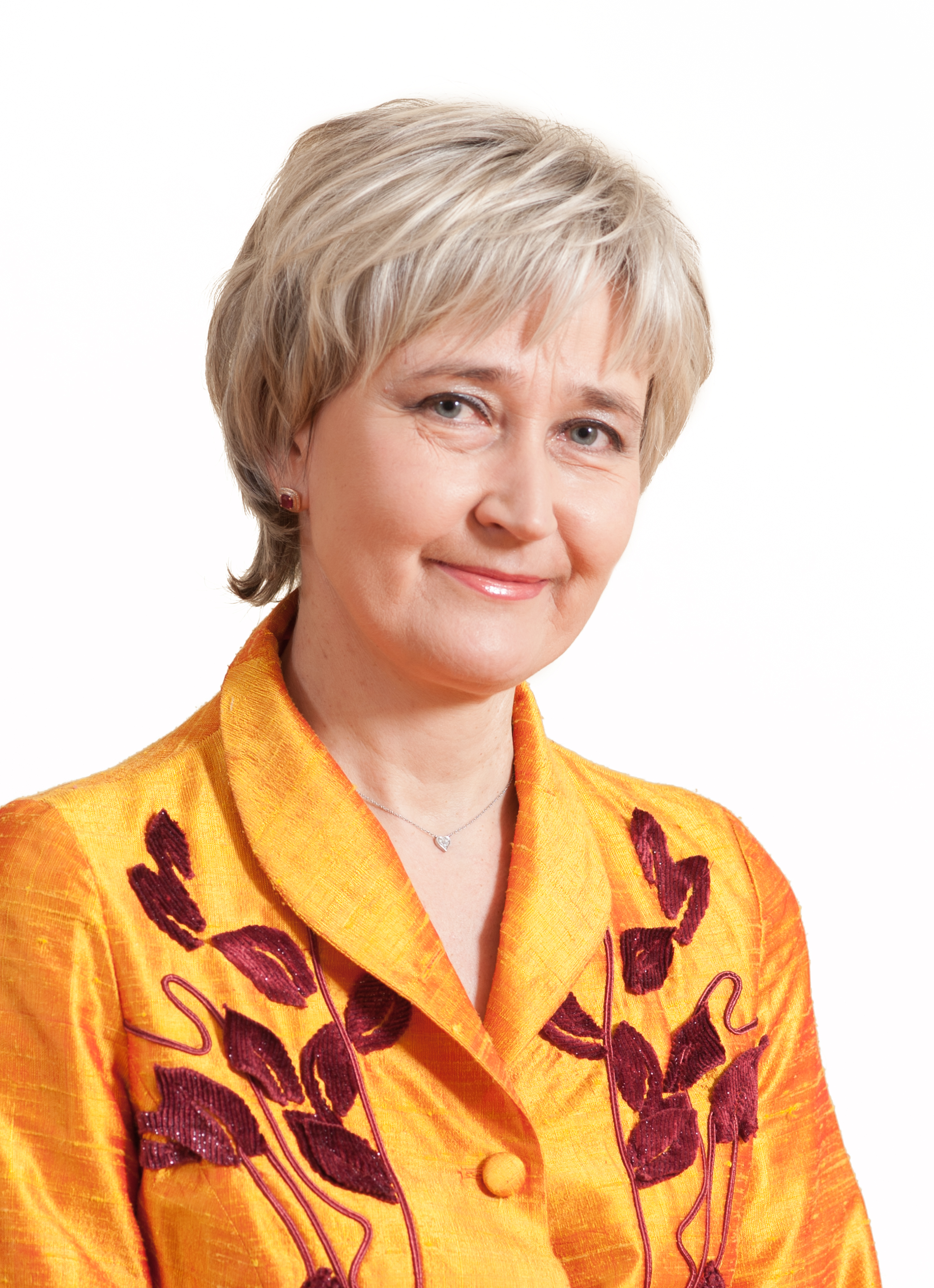 Marianne Mikko